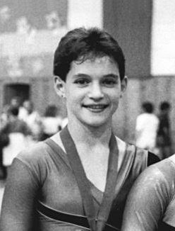 Diana Schröder